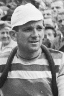 Ronde van Nederland Rizla (internationaal)